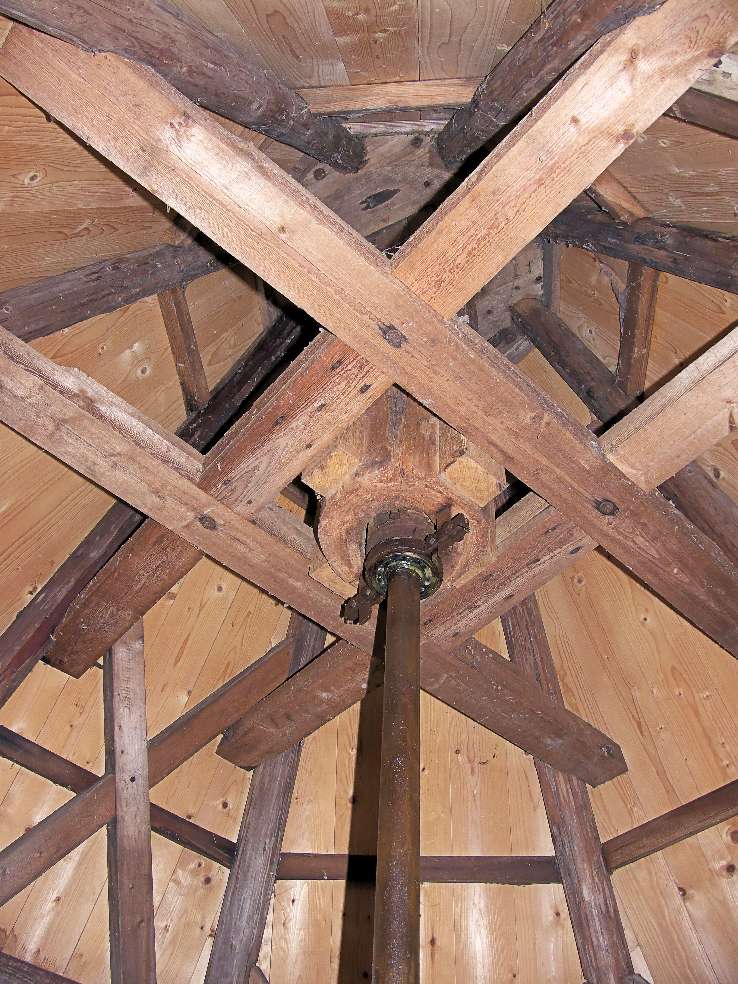 Spinnenkopmolen Wedderveer, koker met koningsspil in ondertoren